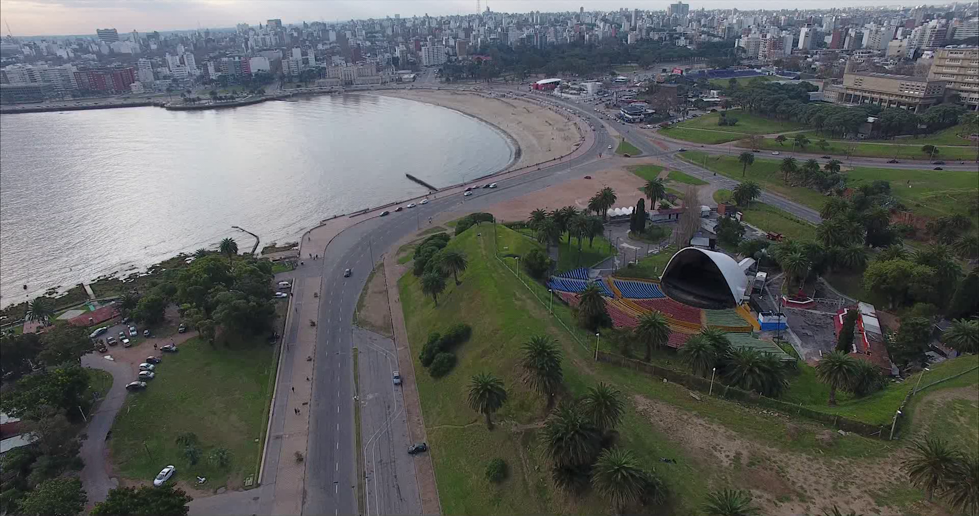 Teatro de verano, Parque Rodó. Montevideo; Uruguay